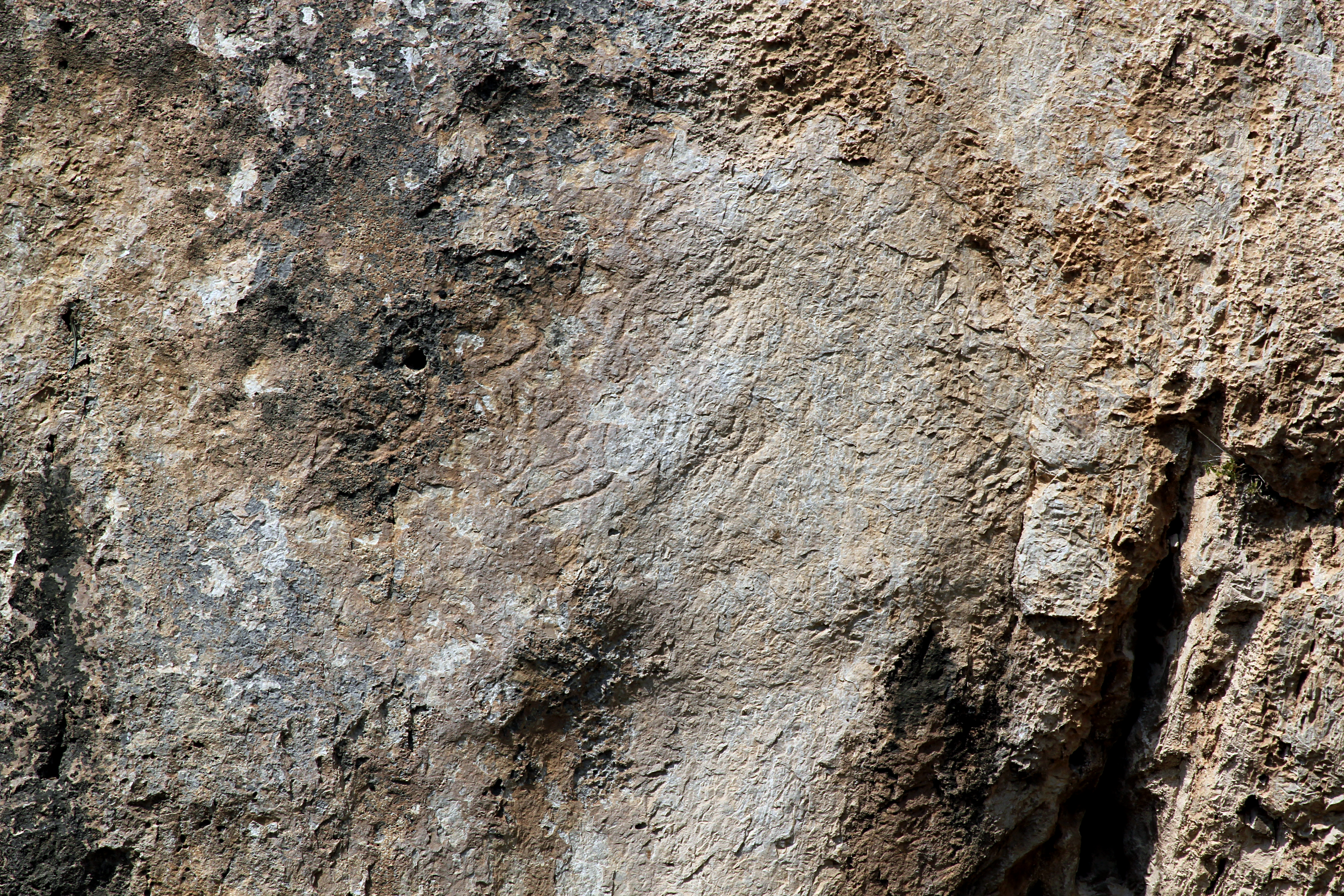 Hieroglyphen-luwische Felsinschrift in Tanır am Fluss Hurman, Südtürkei